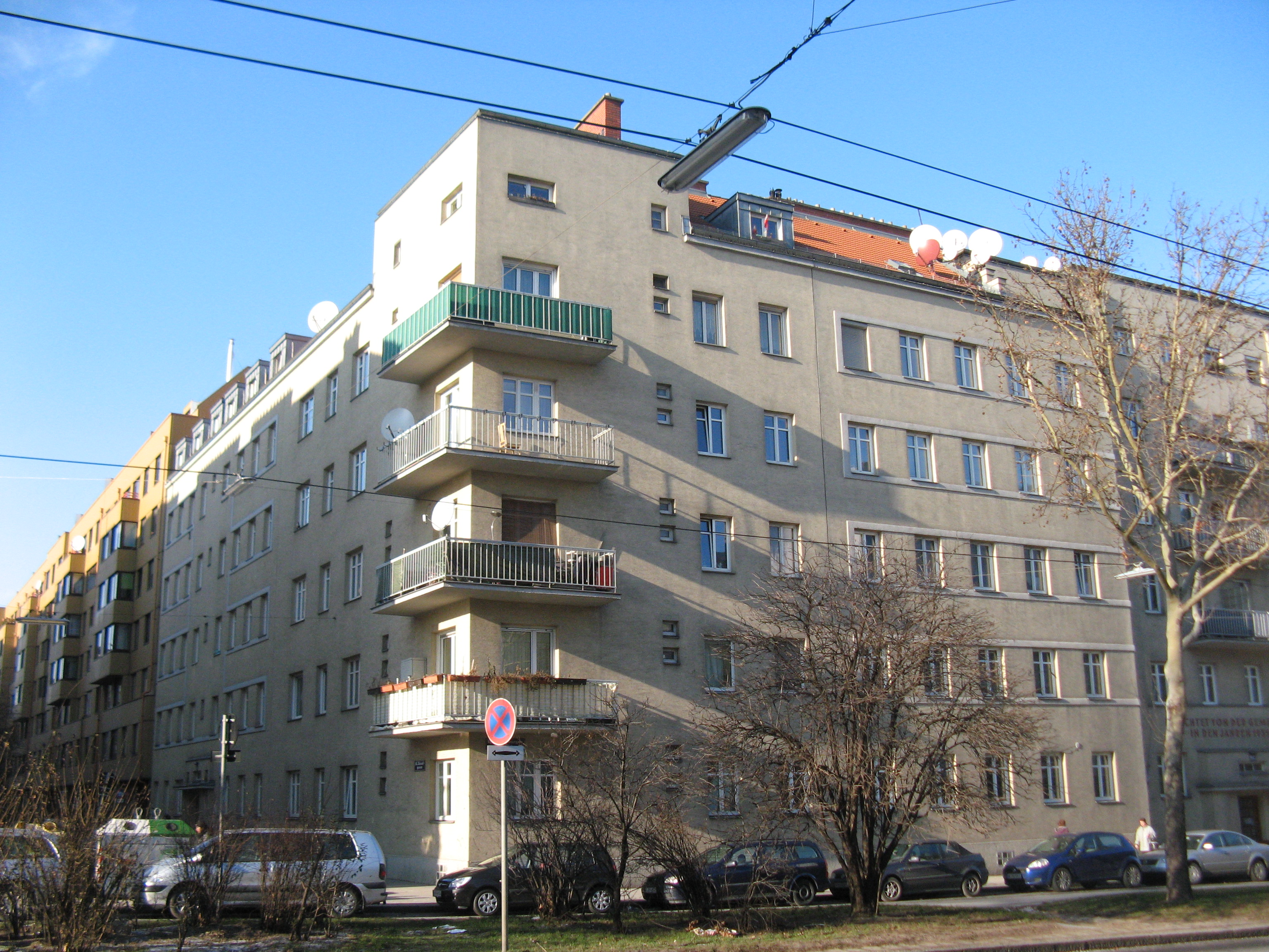 Gemeindebau (1931), Laxenburger Straße 92, Wien-Favoriten